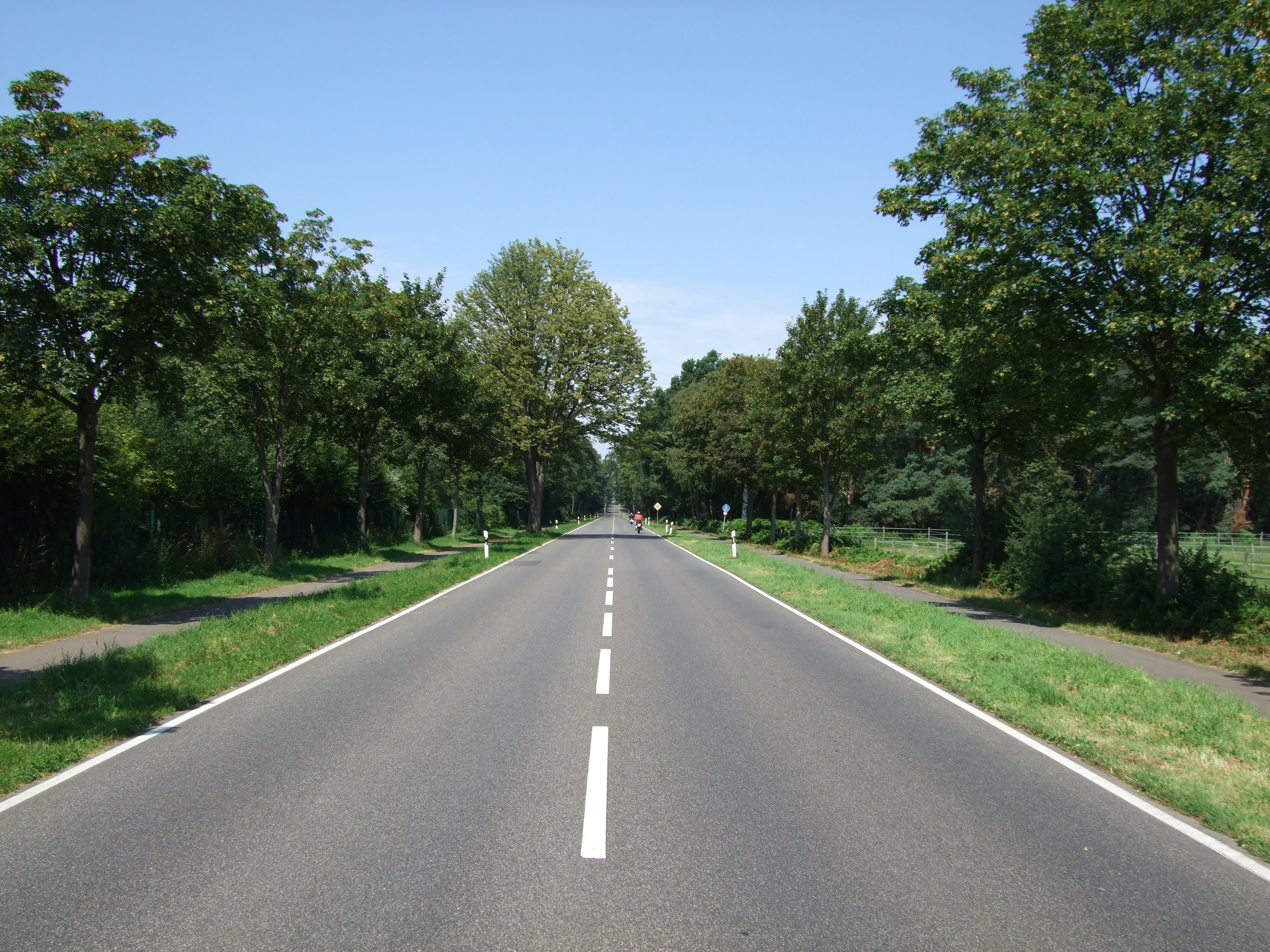 Rheydter-Gerade der ehemaligen Rennstrecke Grenzlandring im Jahr 2007